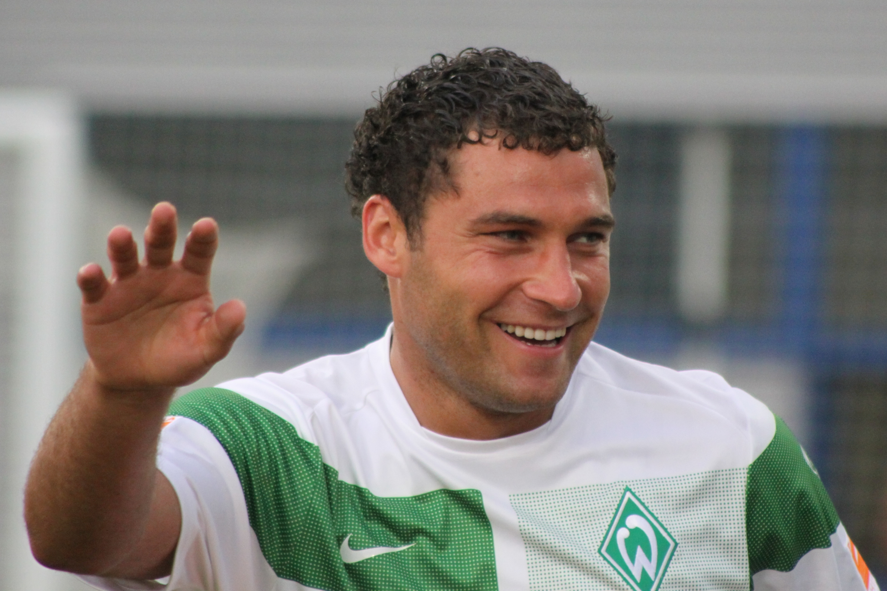 Duško Tošić - SV Werder Bremen (2)